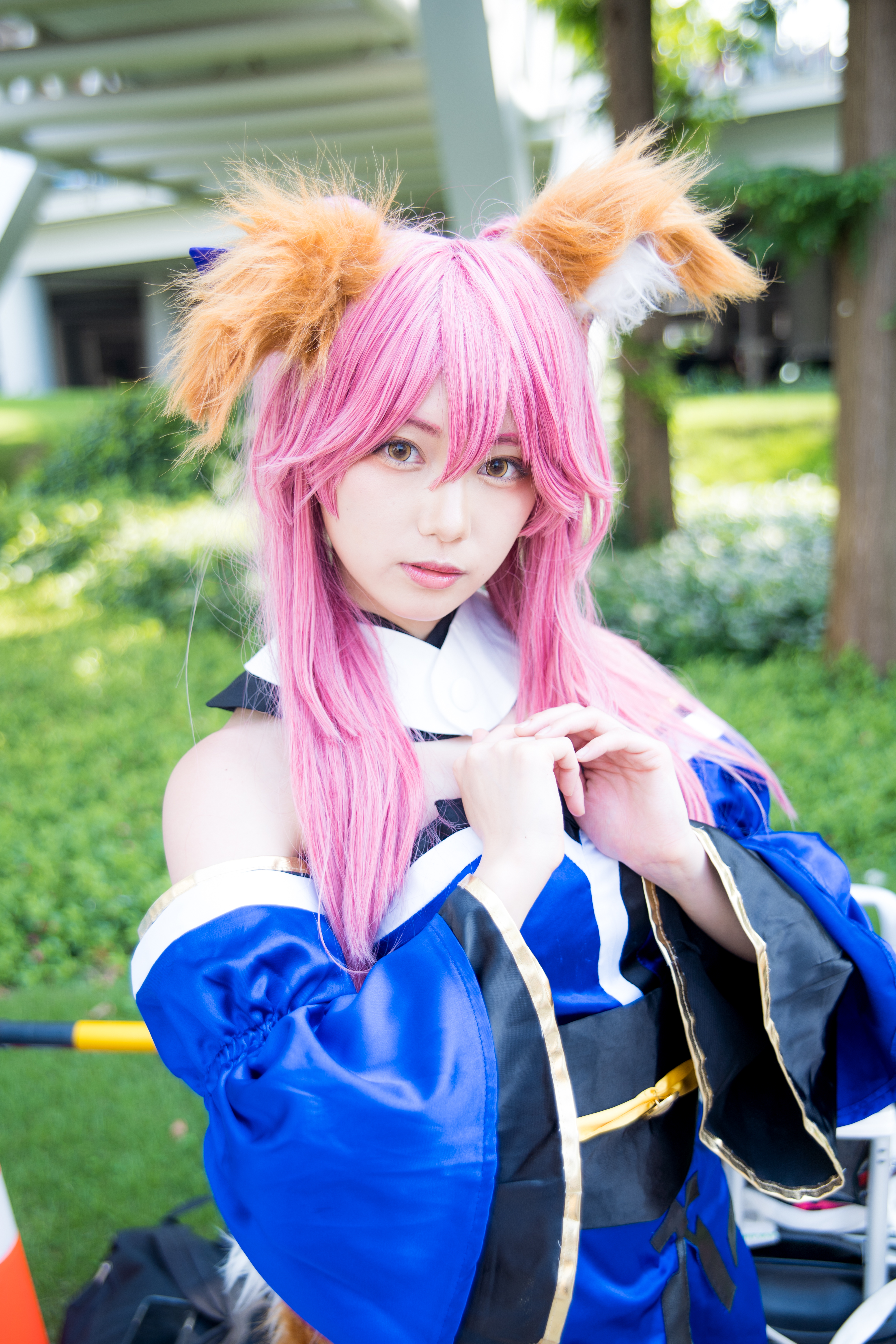 コミックマーケット96 3日目 コスプレイヤー 篠崎こころ